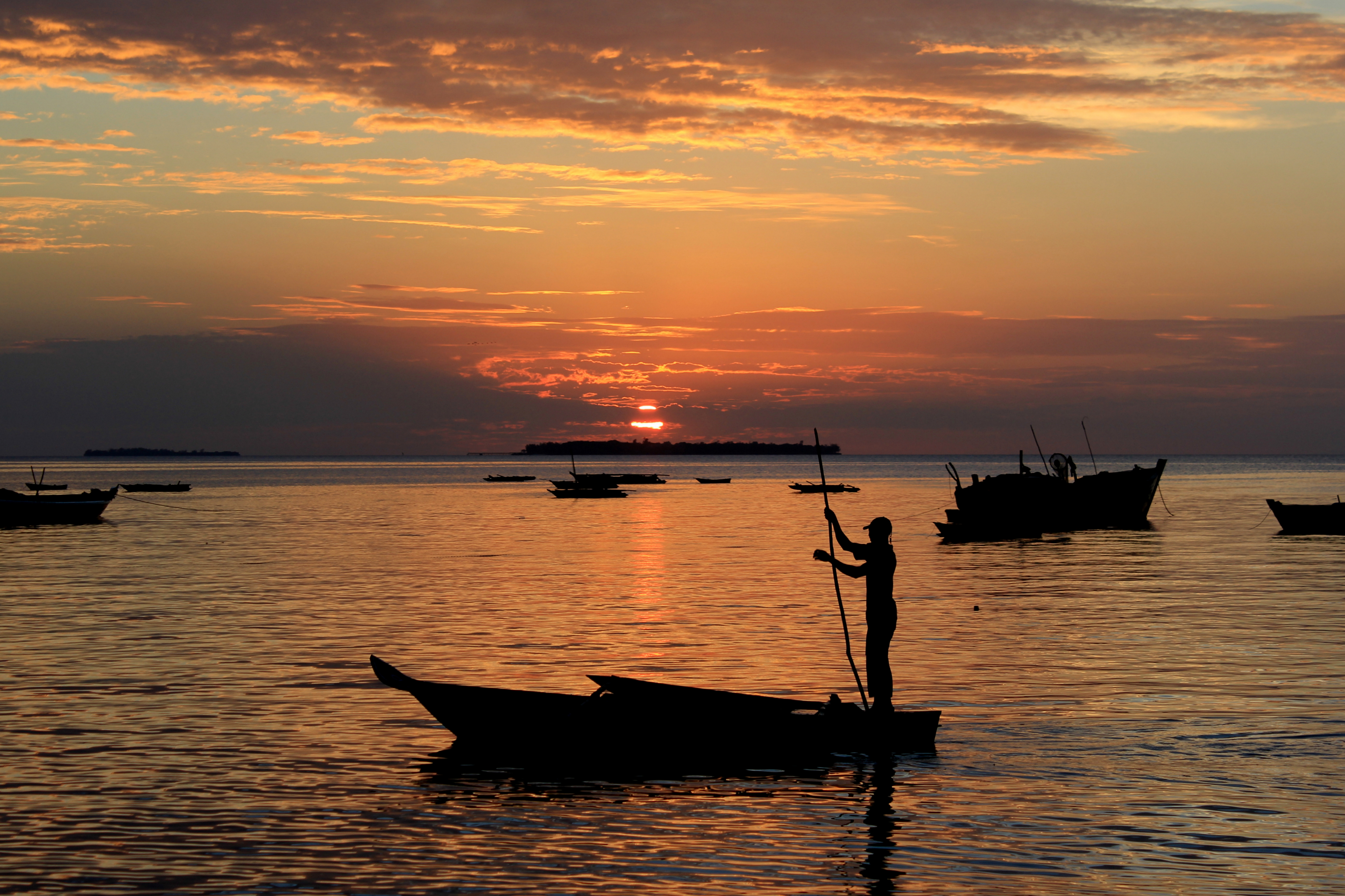 Chuini, Zanzibar Town, Tanzania